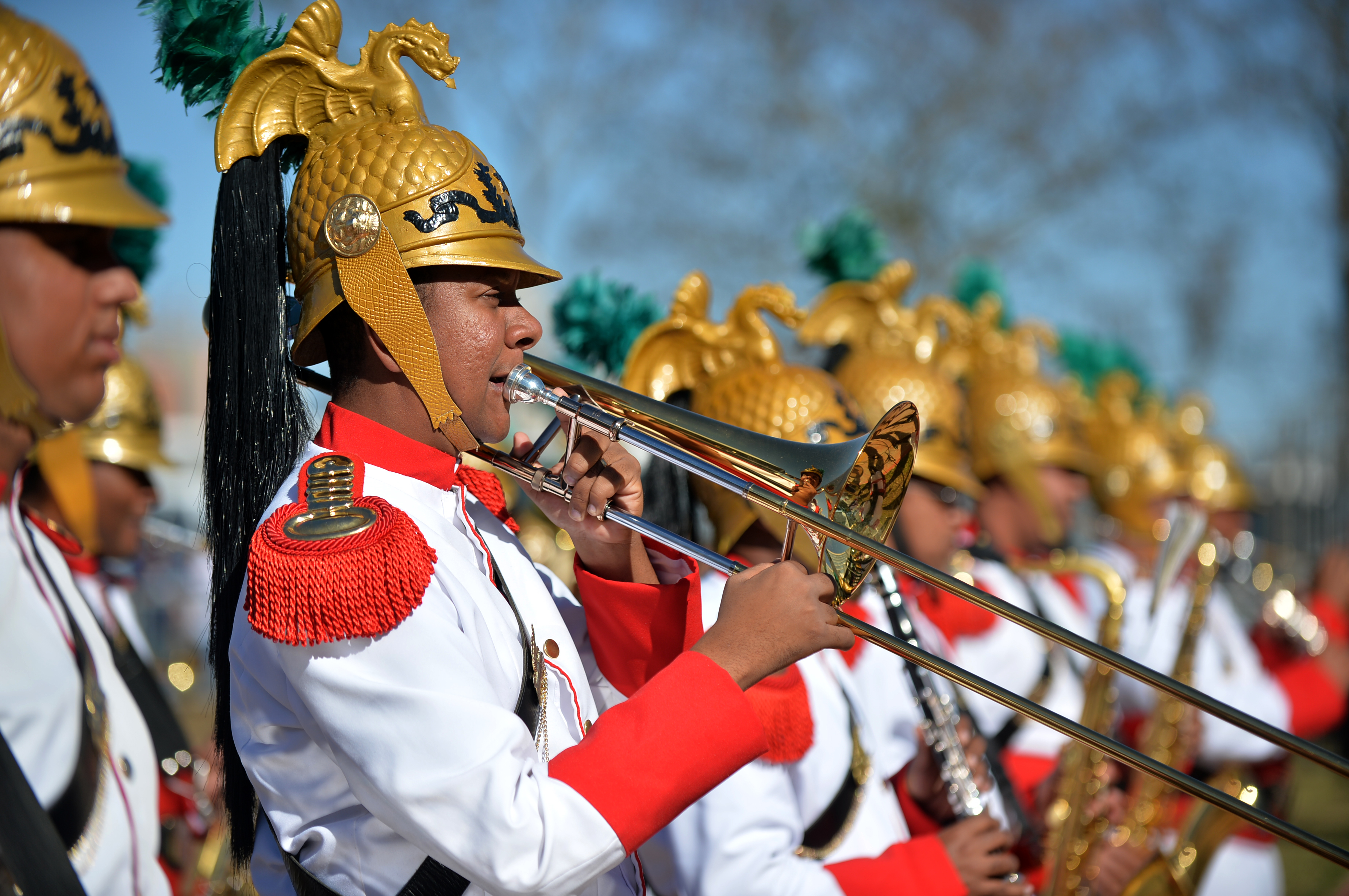 07/09/2014, Brasília - DF Fotos: PH Freitas